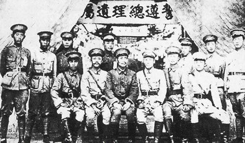 1925年广州，黄埔军校特别党部执委合影。他们身后的横幅上书“誓遵总理遗嘱”。